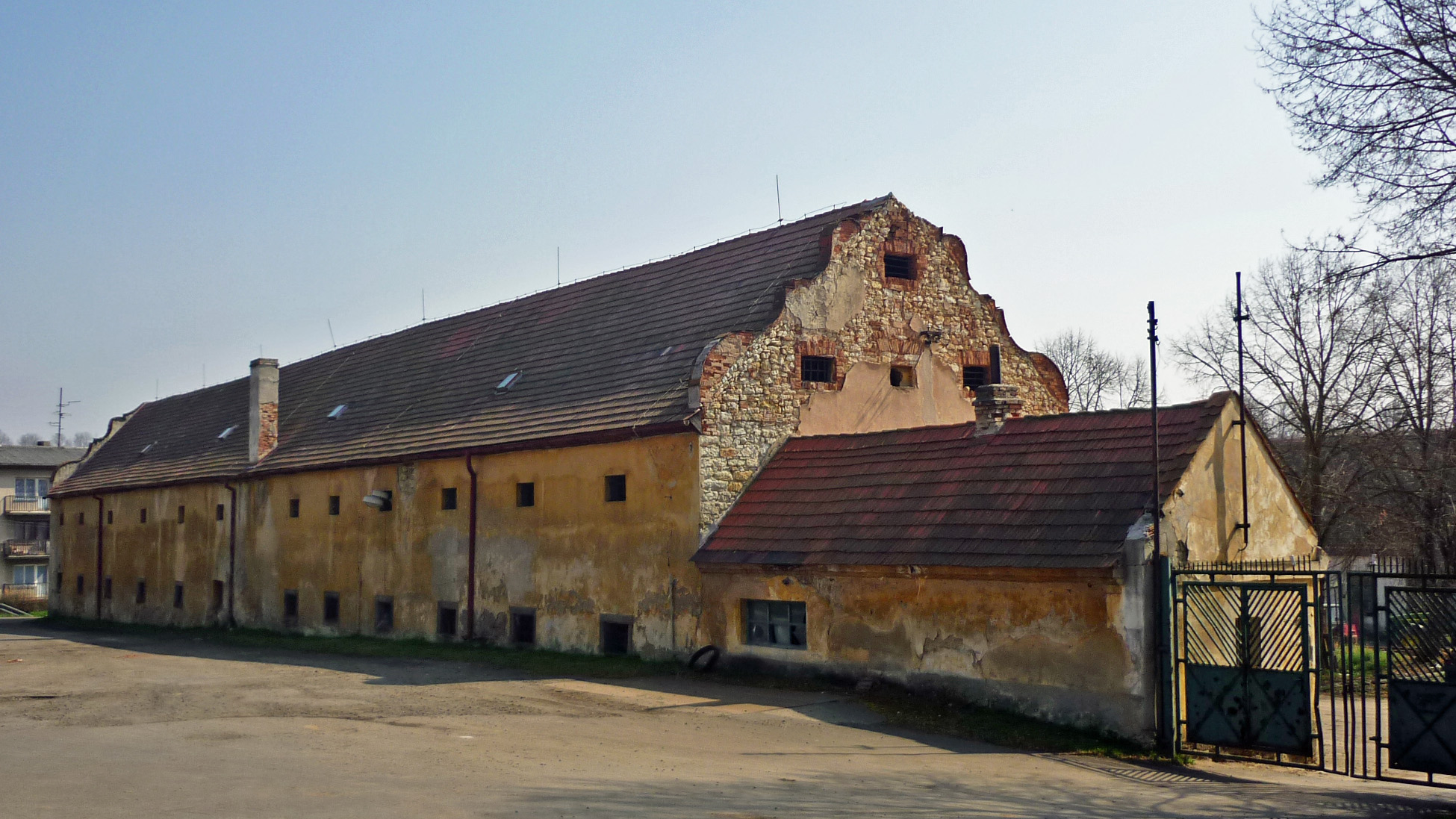 Schloss in Liboritz bei Saaz (Libořice, Okres Louny), Scheune